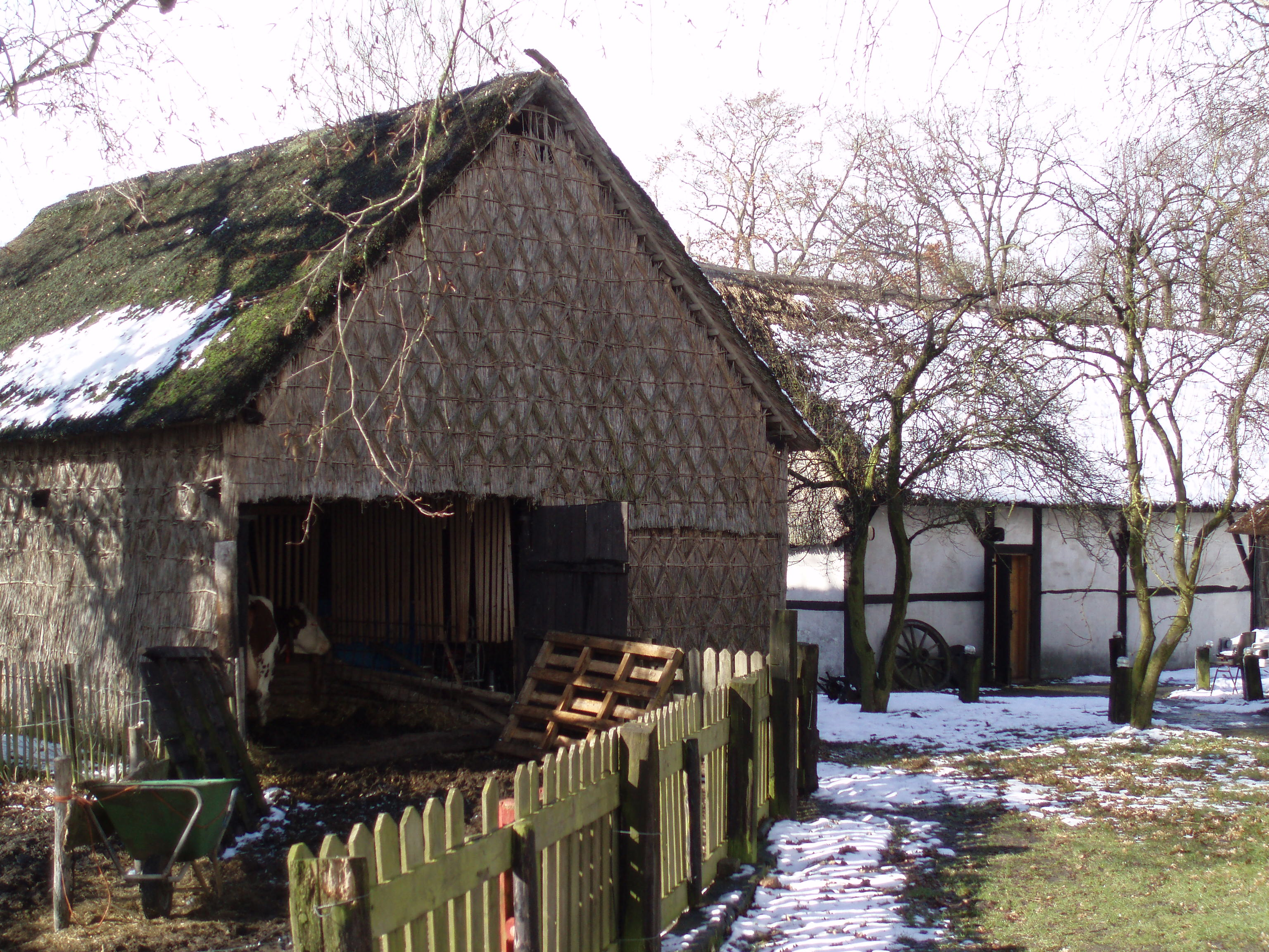 Hekmansboô aan de N863 in Schoonebeek.